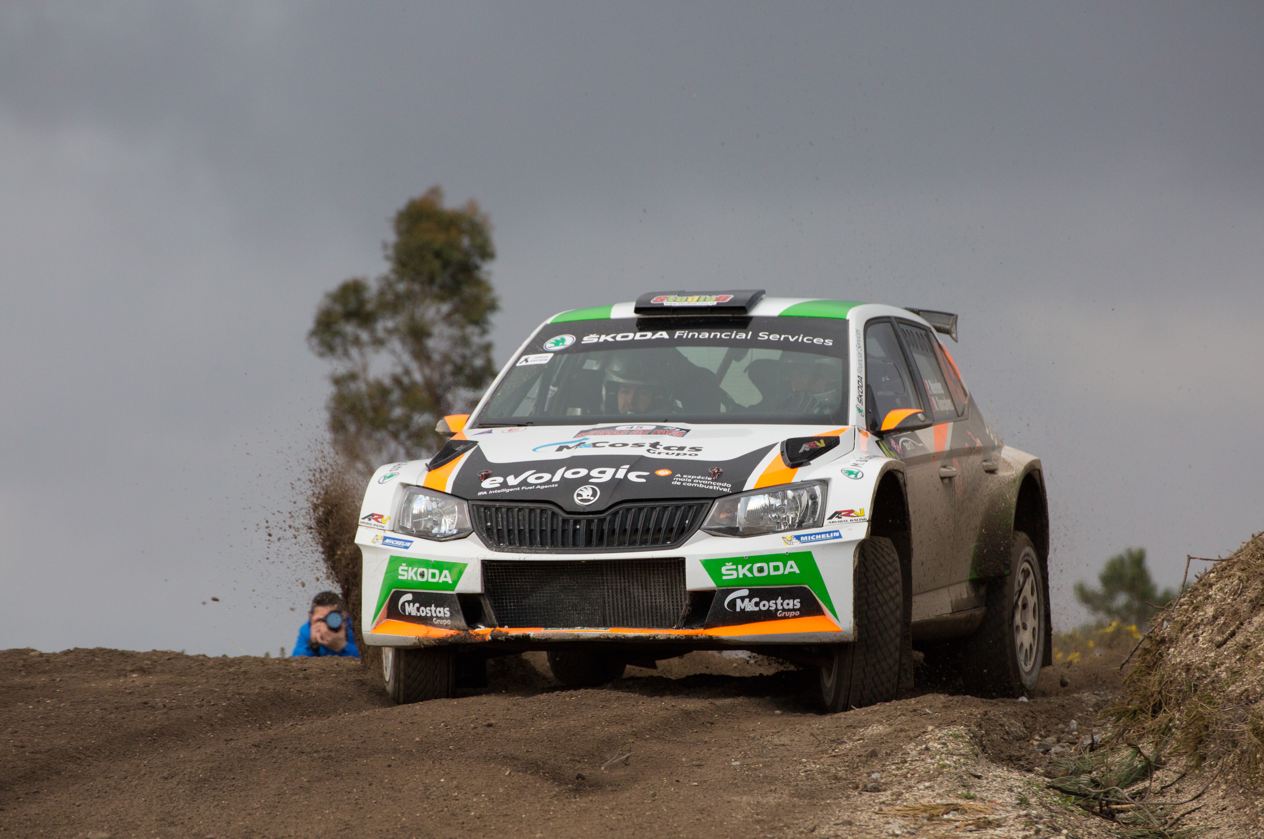 Paulo Meireles Skoda Fabia R5